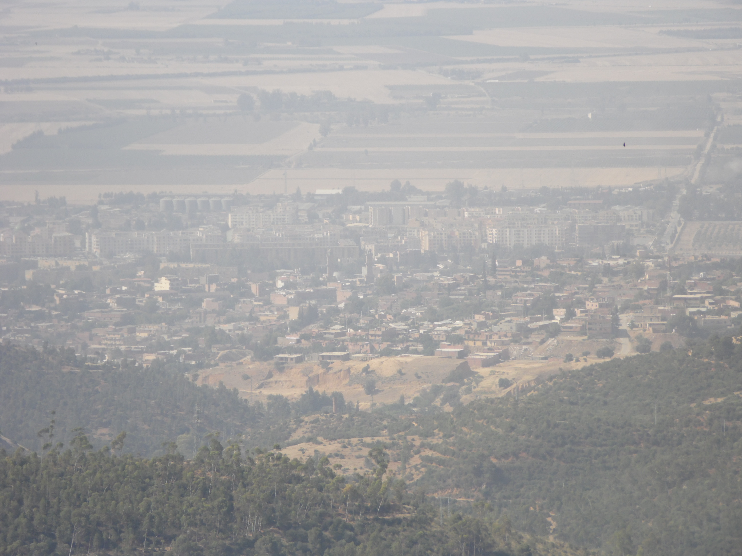 خميس مليانة